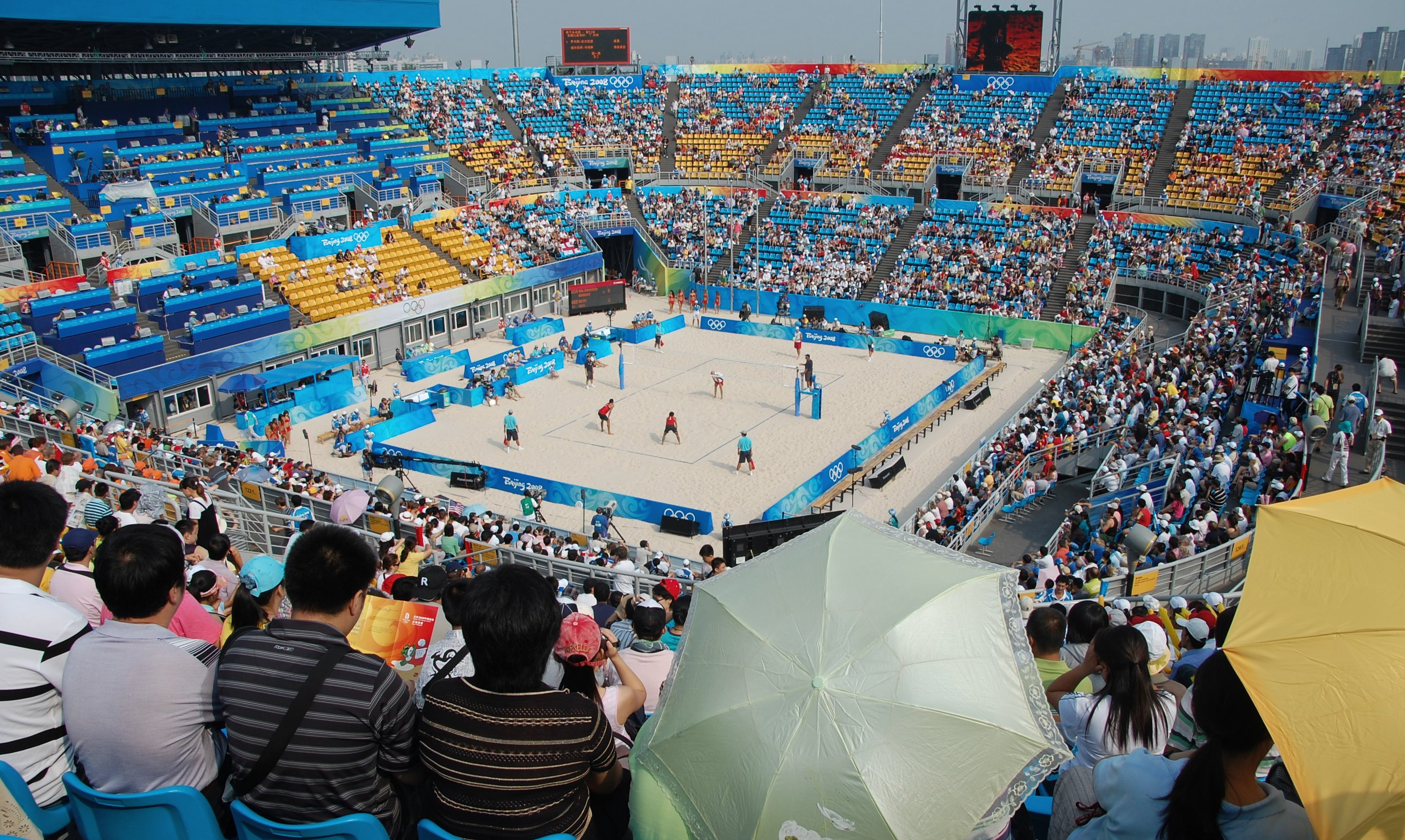 Beach Volleyball Stadium